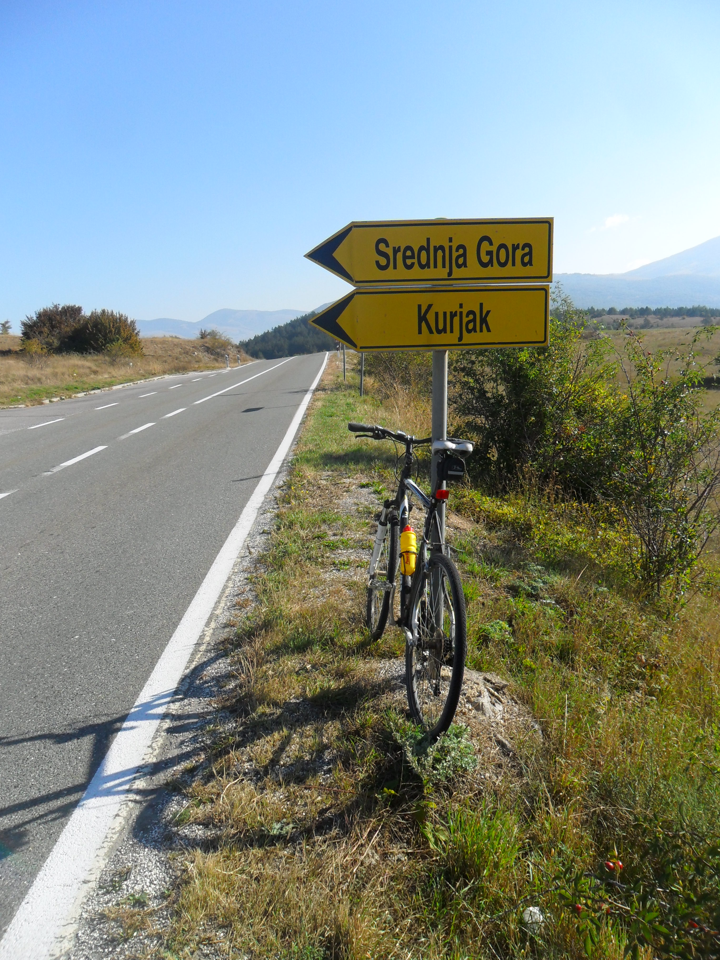 Skretanje za Srednju Goru